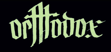 Logo Orthodox 2017